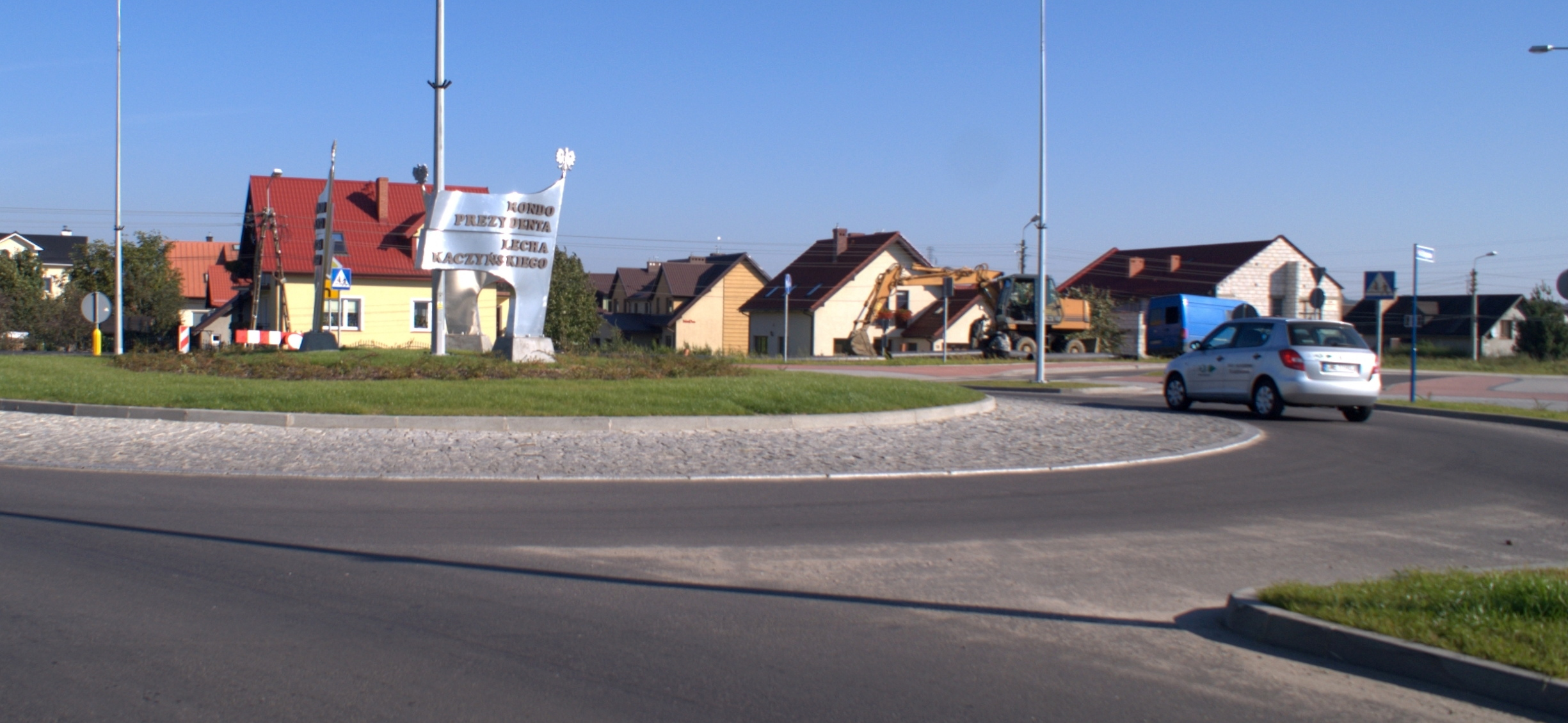 Rondo Prezydenta Lecha Kaczyńskiego w Rumi u zbiegu ulic Gdańskiej i Dębogórskiej. Nazwane i poświęcone 8 sierpnia 2010r, w czasie obchodów 30 rocznicy powstania NSZZ „Solidarność”. Autorami projektu pomnika są Eugeniusz Lademann i Zdzisław Koseba, a wykonawcom Jarosław Kowalski.